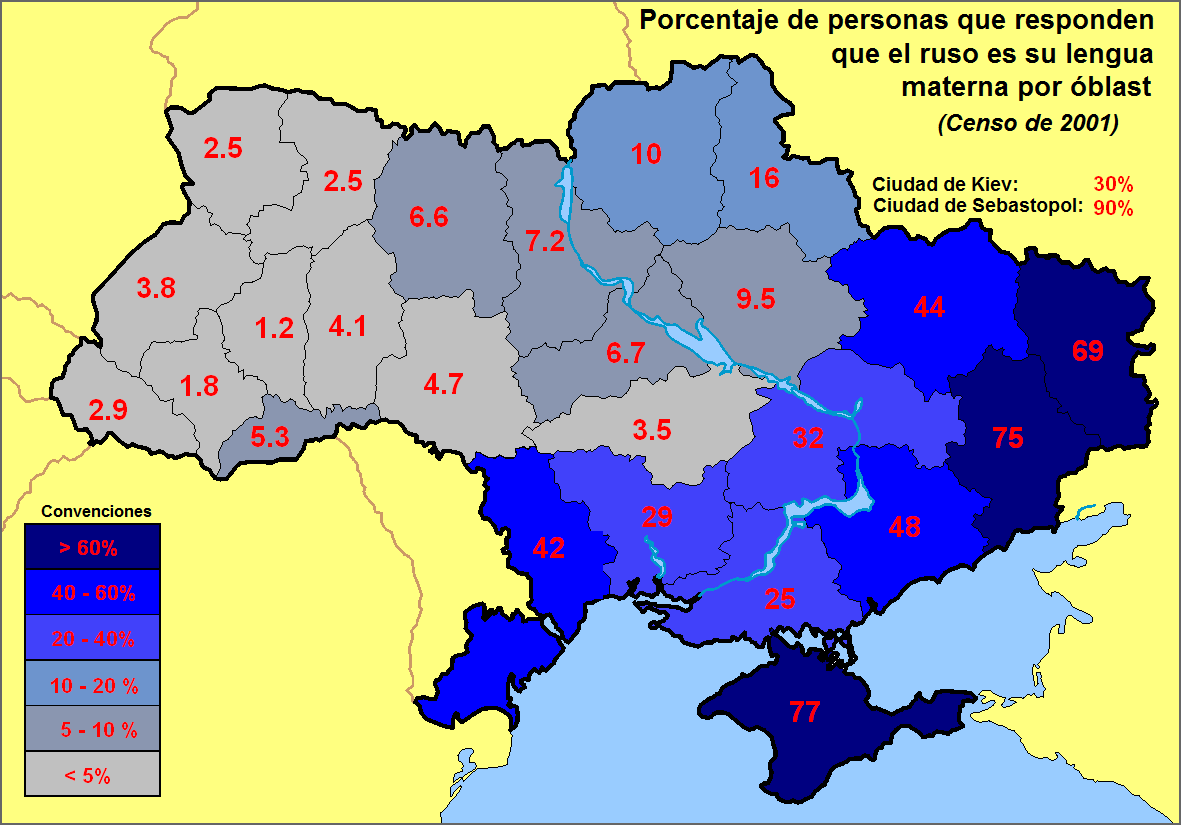 Versión en español de Image:Ruslangsup.PNG